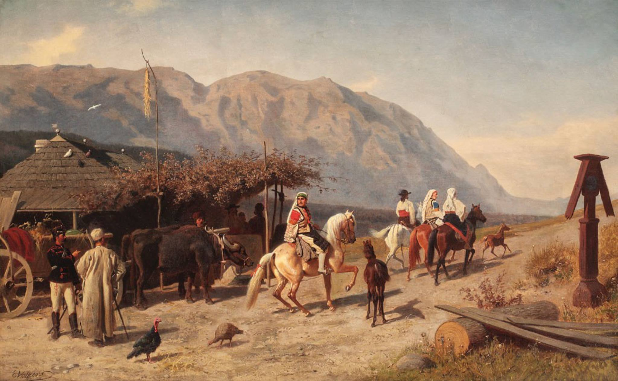 Han la Câmpulung / Rumänisches Landvolk